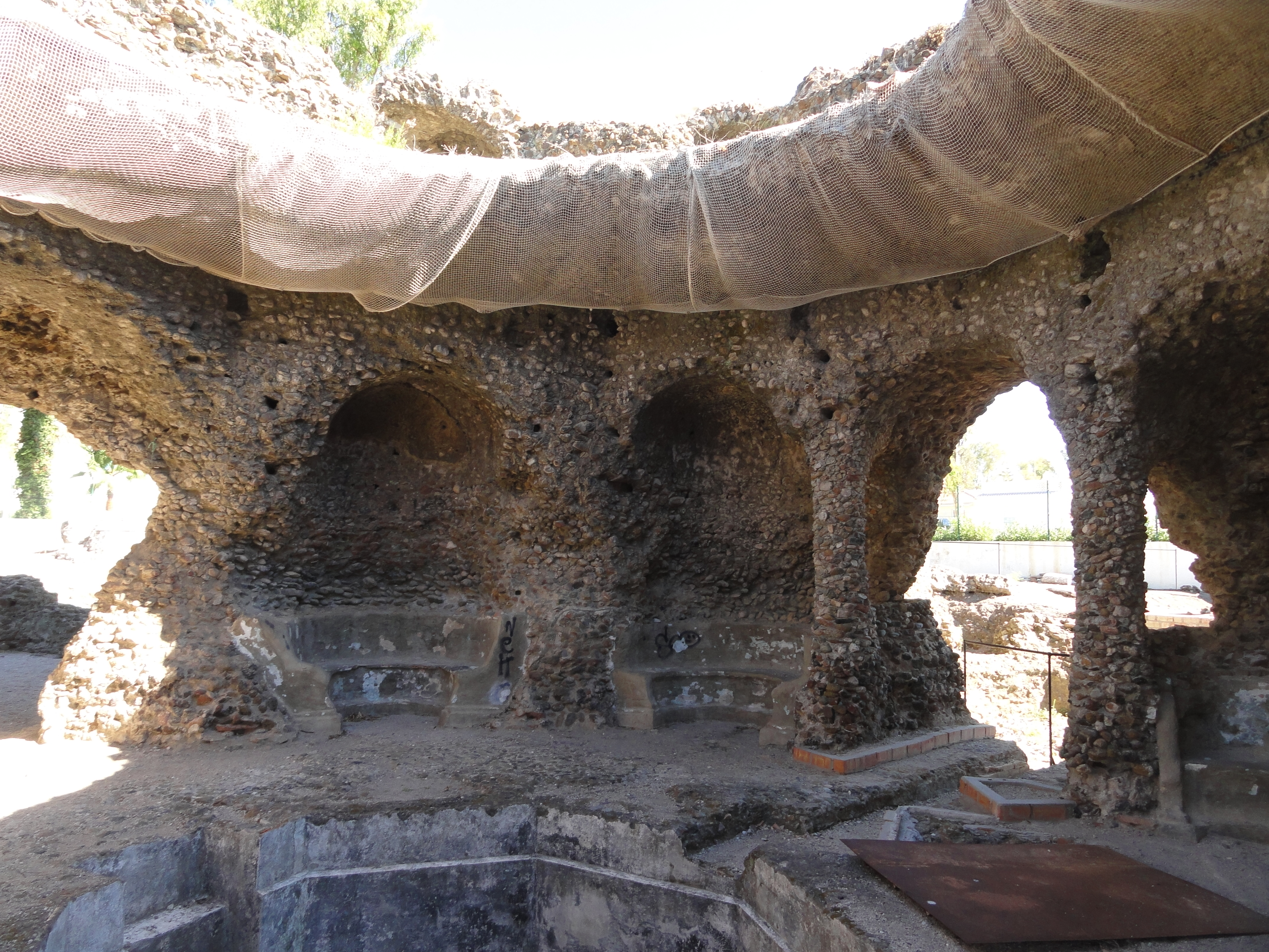 Termas romanas de las Bóvedas